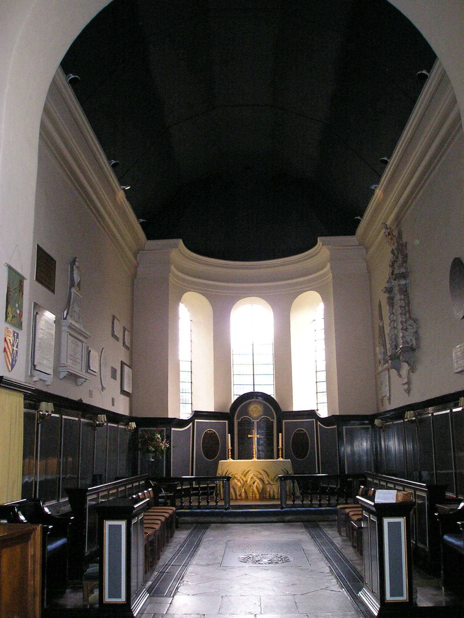 Wye_in_Kent,_St_Gregory_and_St_Martin_Church,_Chor,_Innenansicht